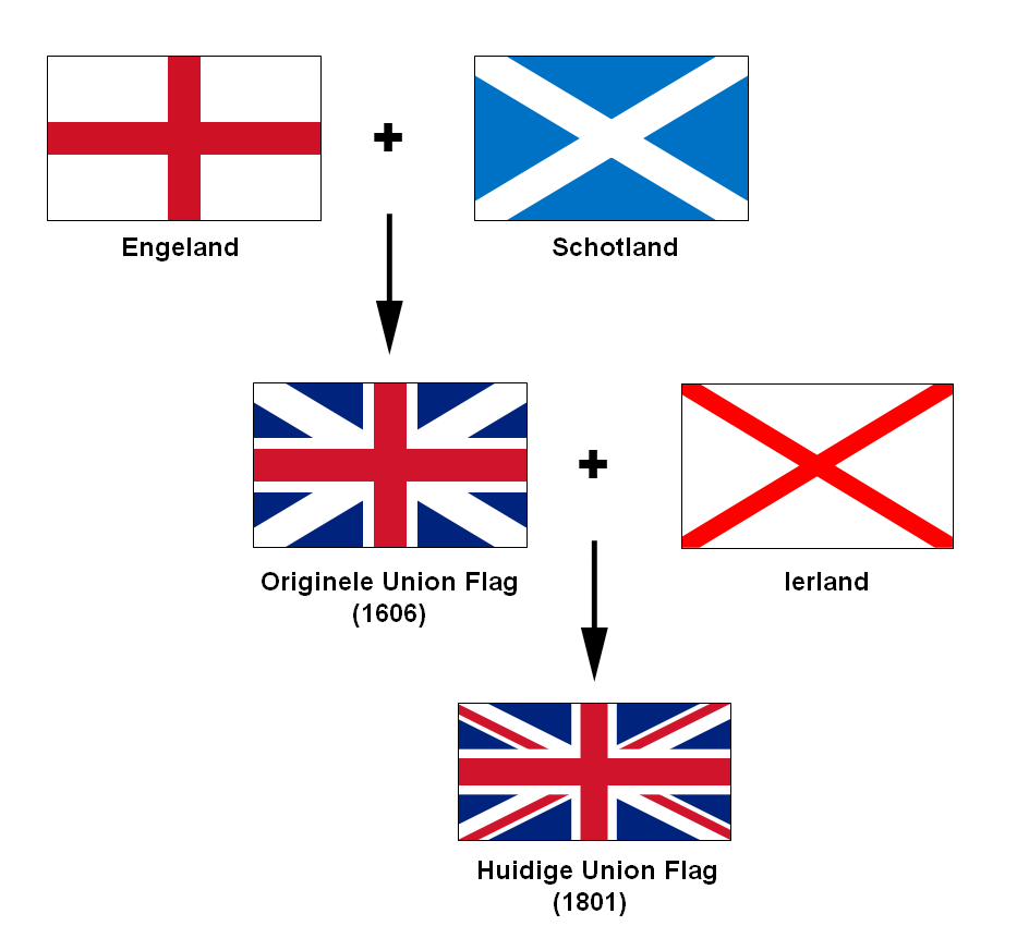 Historie van de Union Flag. Gemaakt van Image:Flags of the Union Jack.png van de Engelse Wikipedia.